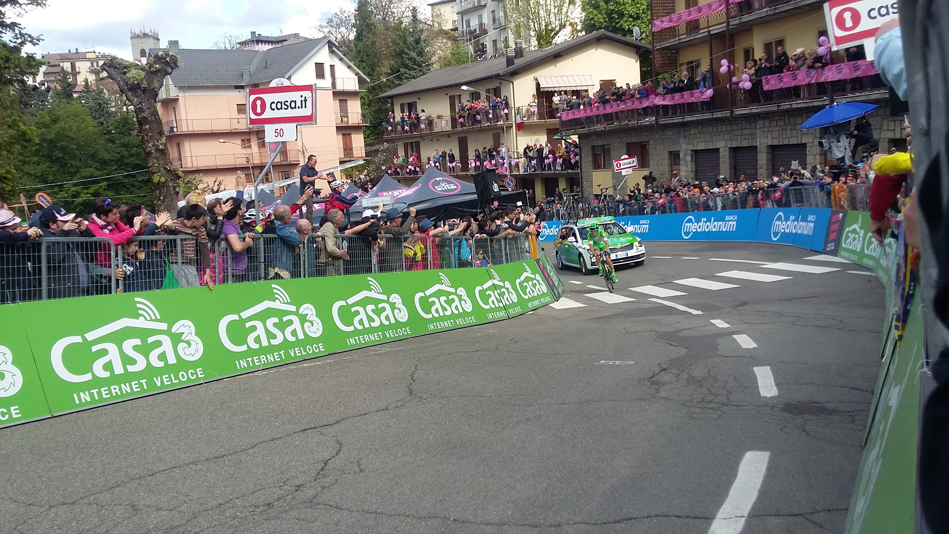 Giulio Ciccone al suo arrivo a Sestola, 10° tappa del Giro d'Italia 2016